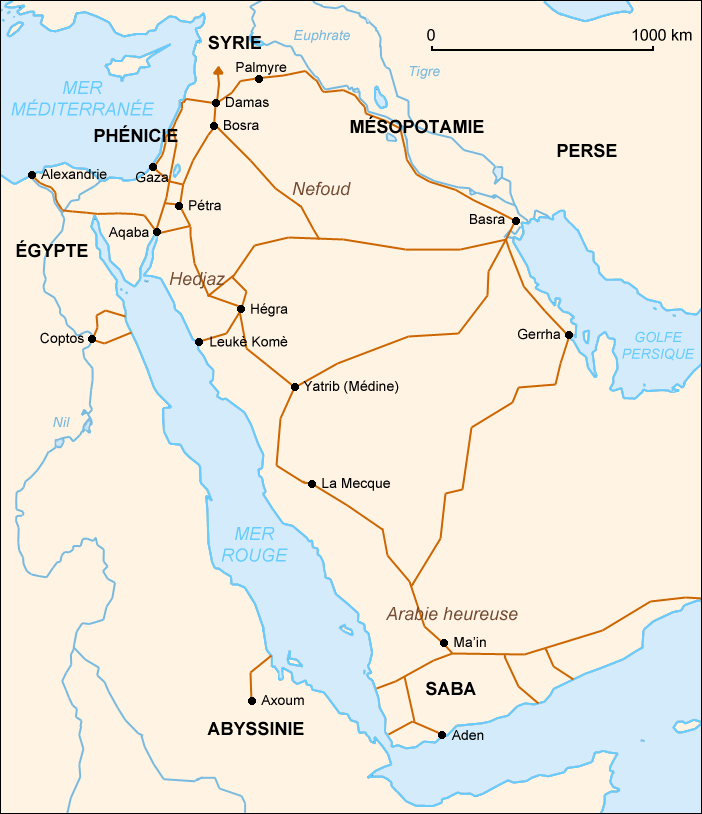 Carte des routes commerciales terrestres du temps des Nabatéens vers le 1er siècle.